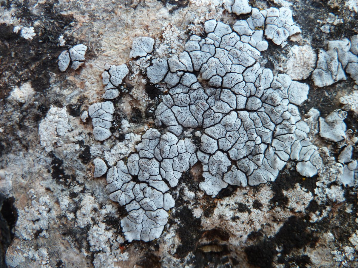 "Placocarpus schaereri", Viens (Vaucluse, Provence, France)